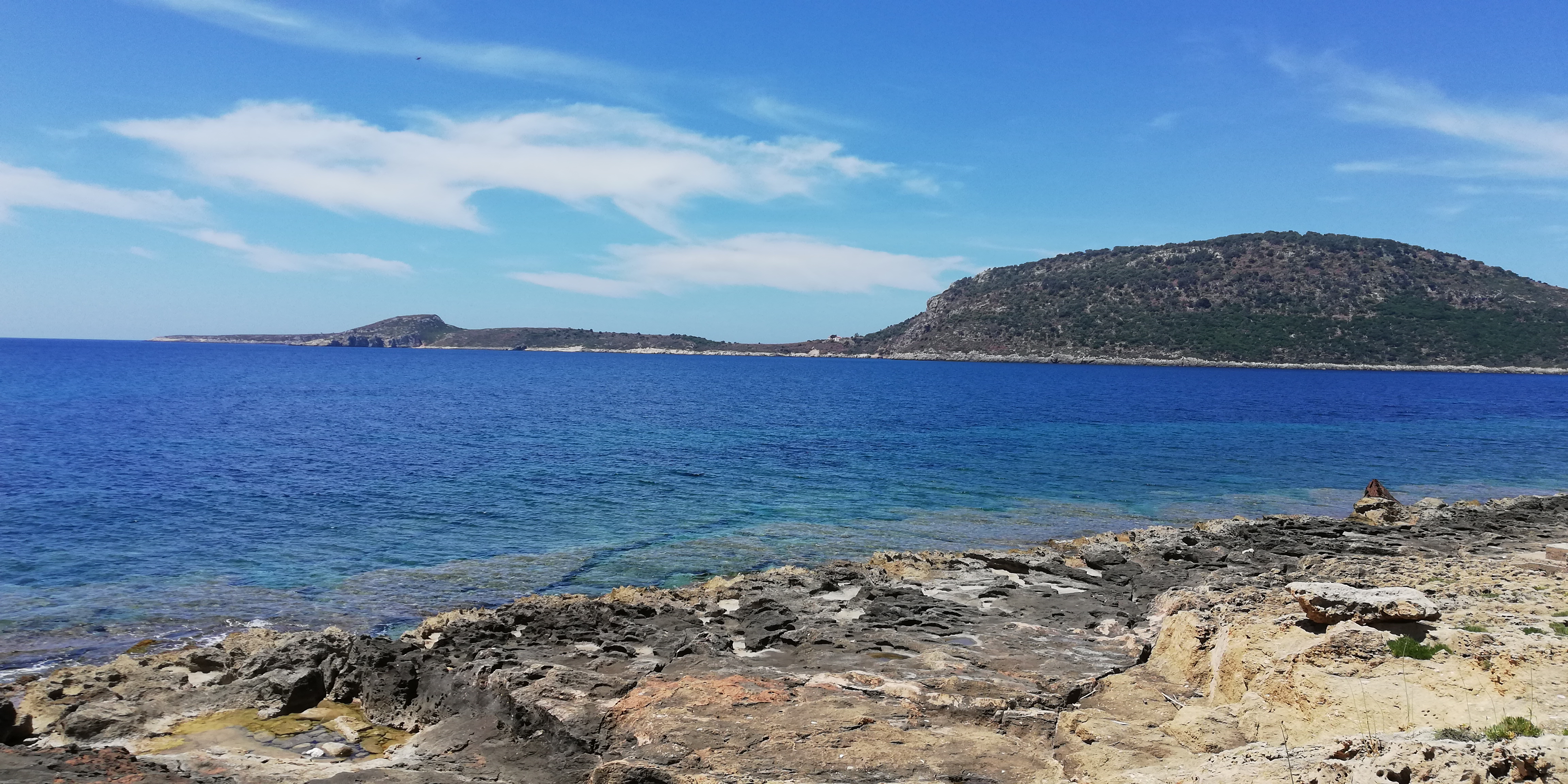 Θέα της νήσου Πρώτη από το Διαλισκάρι